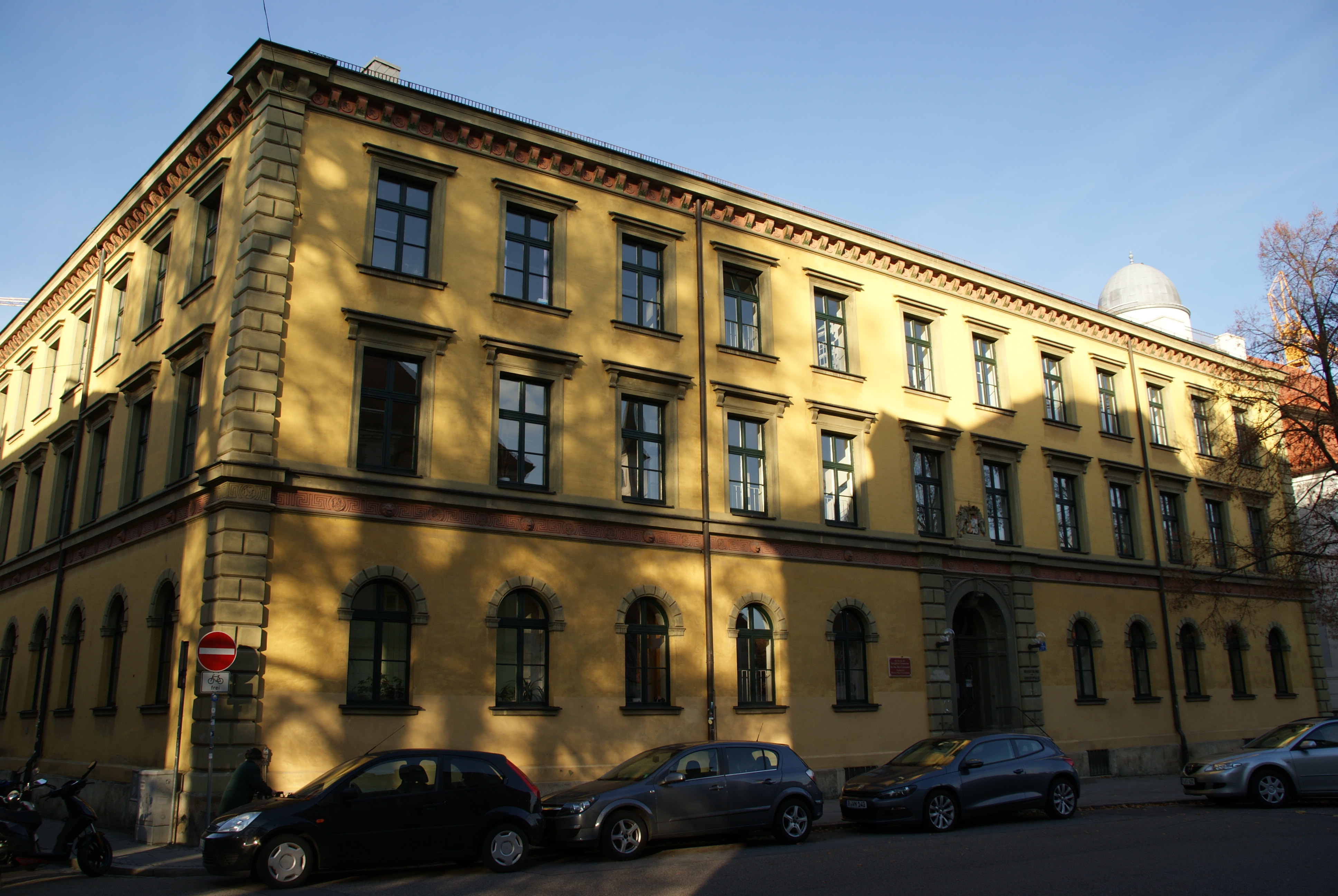 Ehem. Altes Gymnasium und Phil.-Theol. Hochschule, heute Regierung der OberpfalzThis is a photograph of an architectural monument.